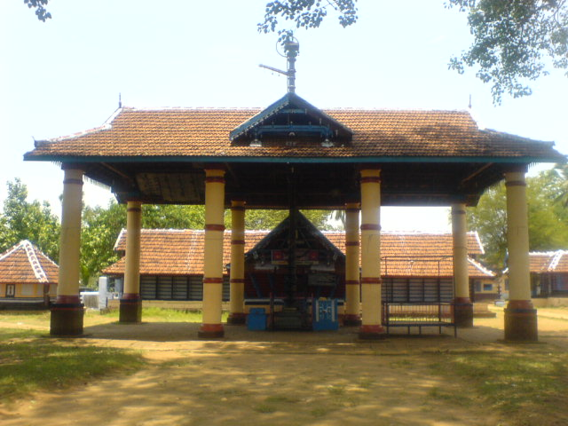 Vayilyamkunnu Temple